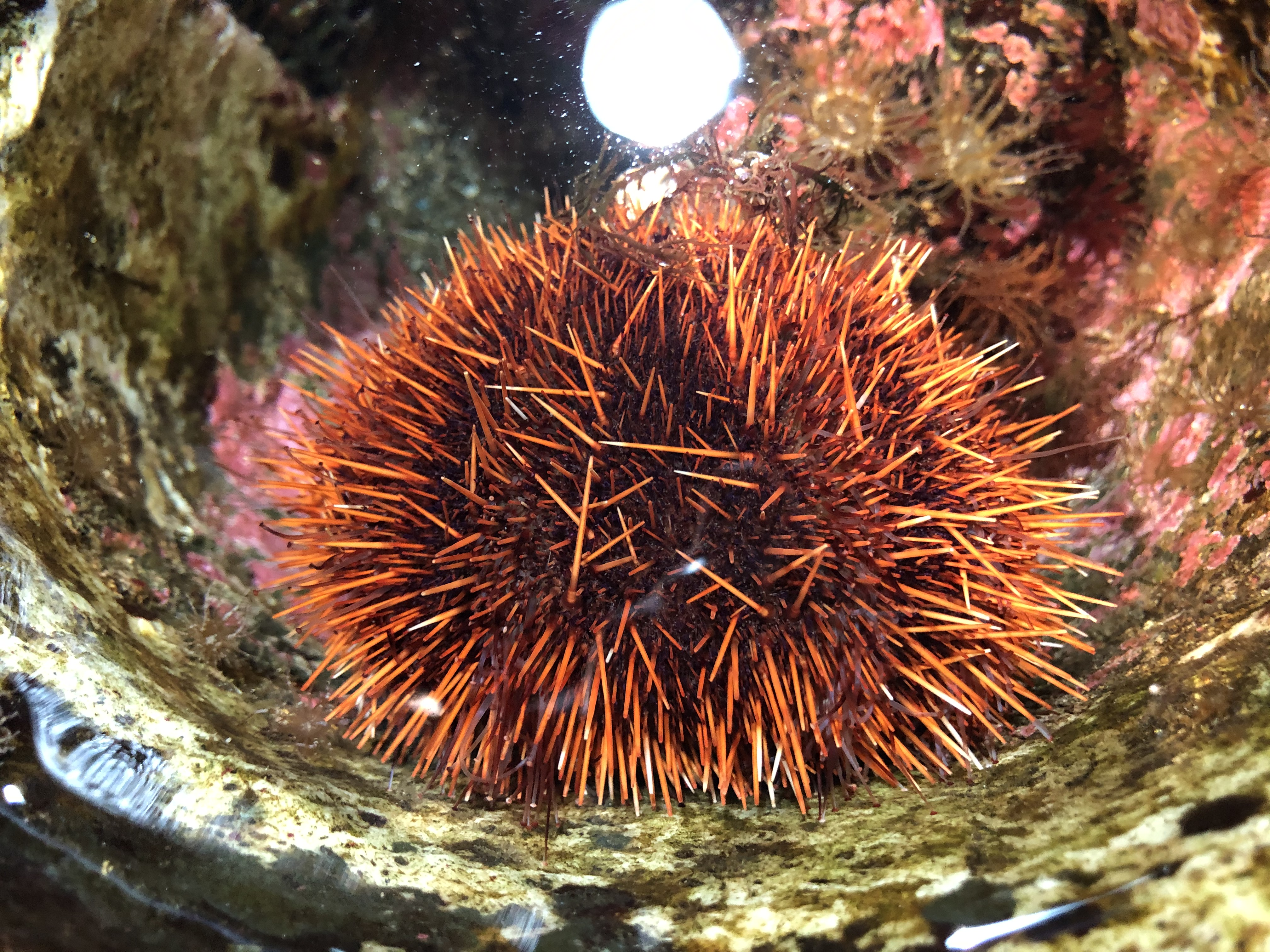 アカウニ（いおワールドかごしま水族館飼育個体）